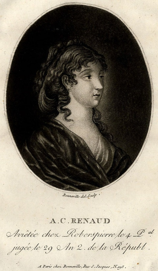 Cécile Renault, estampe.